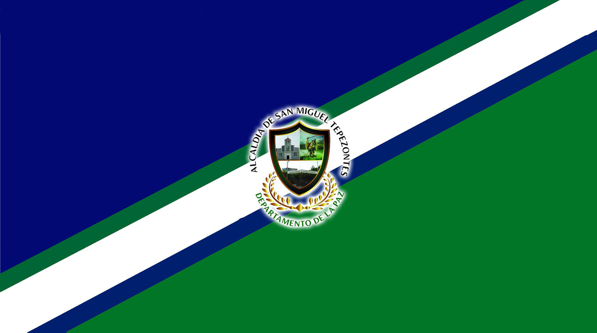 Bandera del municipio de San Miguel Tepezontes